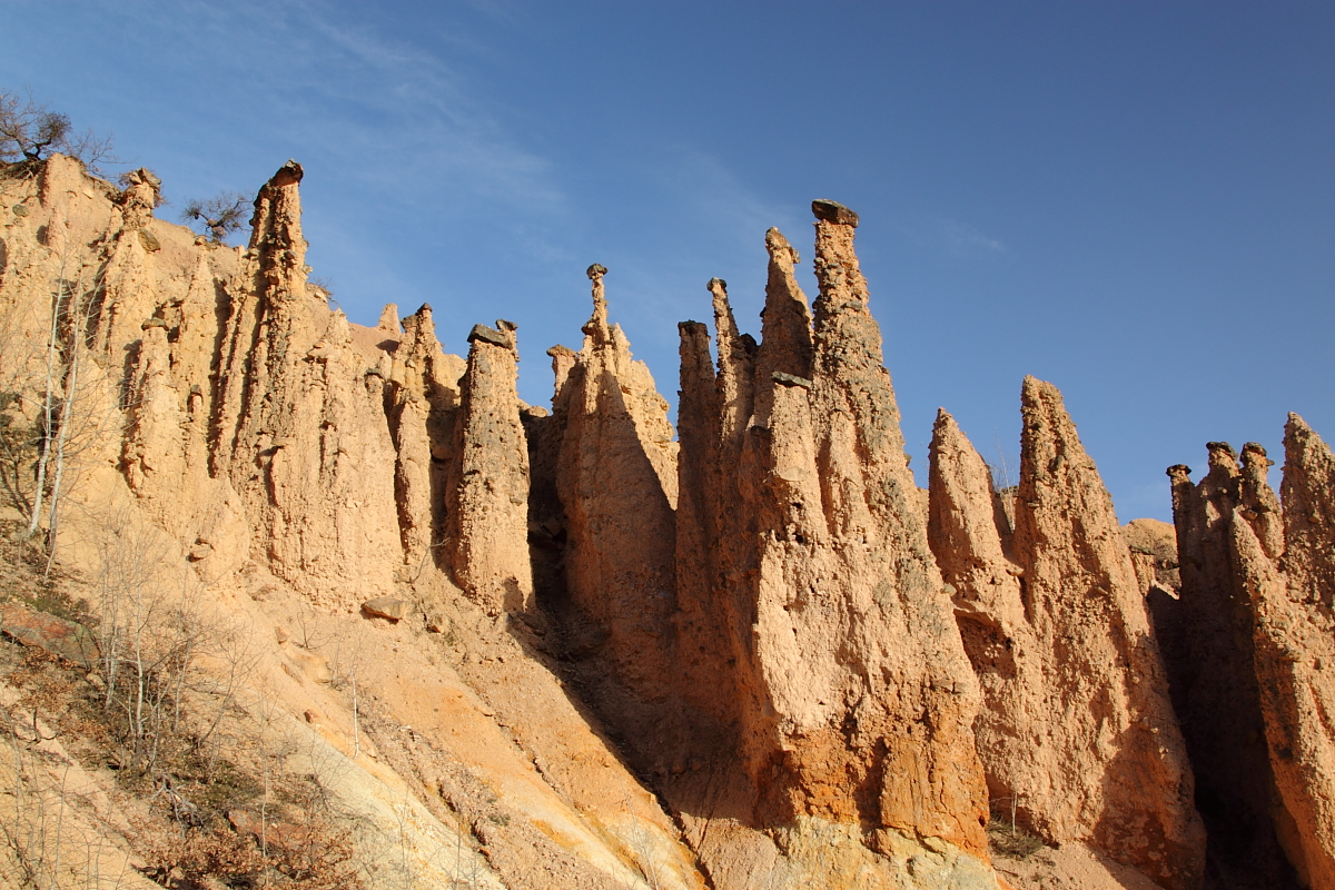 Přírodní památka Đavola Varoš nedaleko Kuršumlije, Srbsko